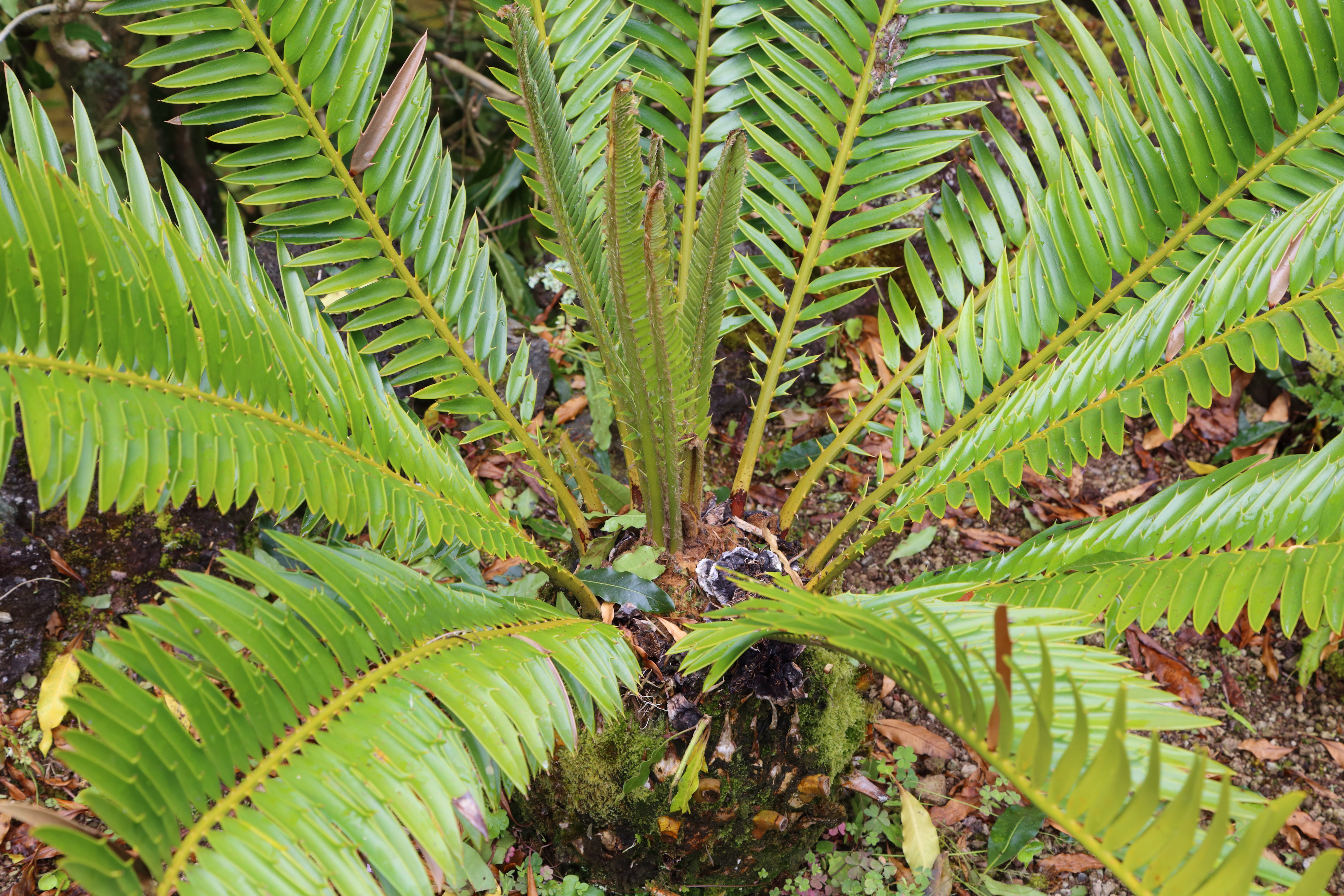 Encephalartos equatorialis i parken Terra Nostra, Furnas, Azorerna.